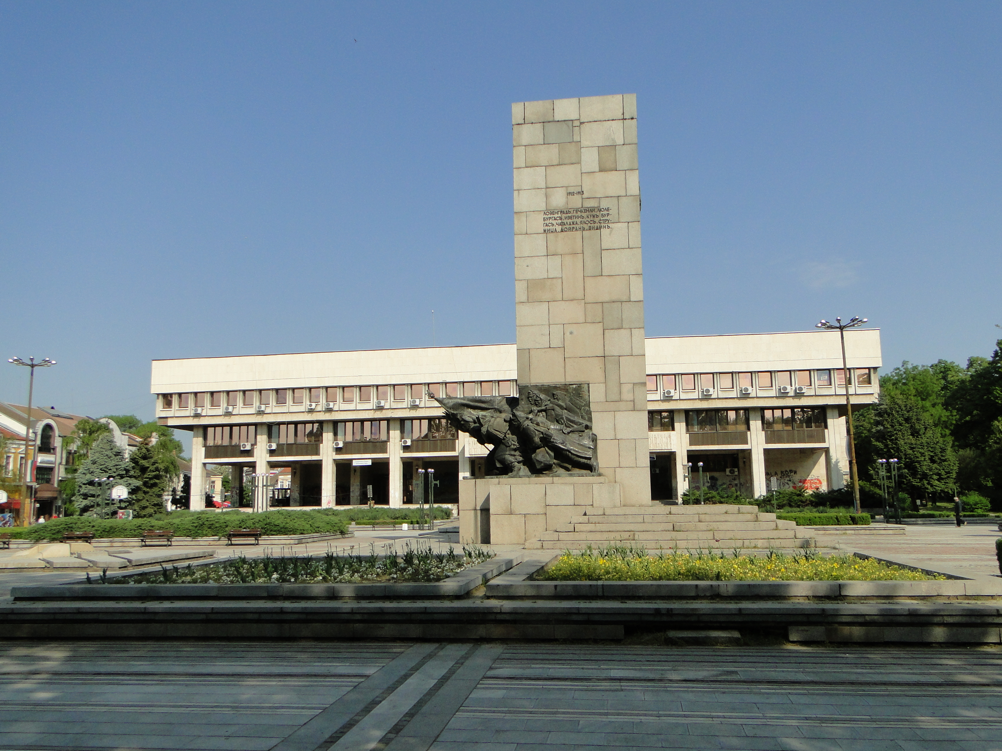 Видин, май 2013